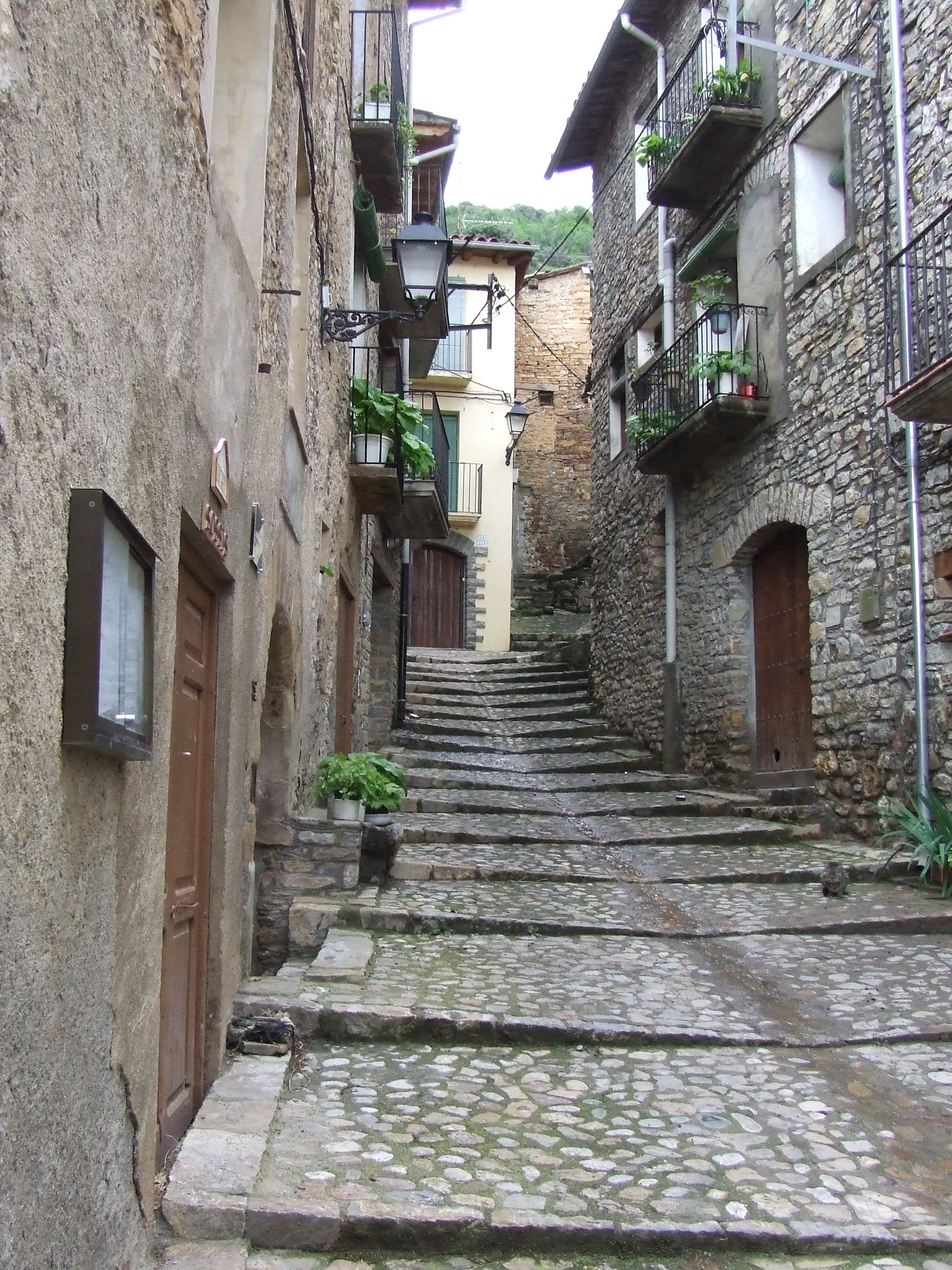 Carrer Major de Sossís (Claverol, Conca de Dalt, Pallars Jussà)